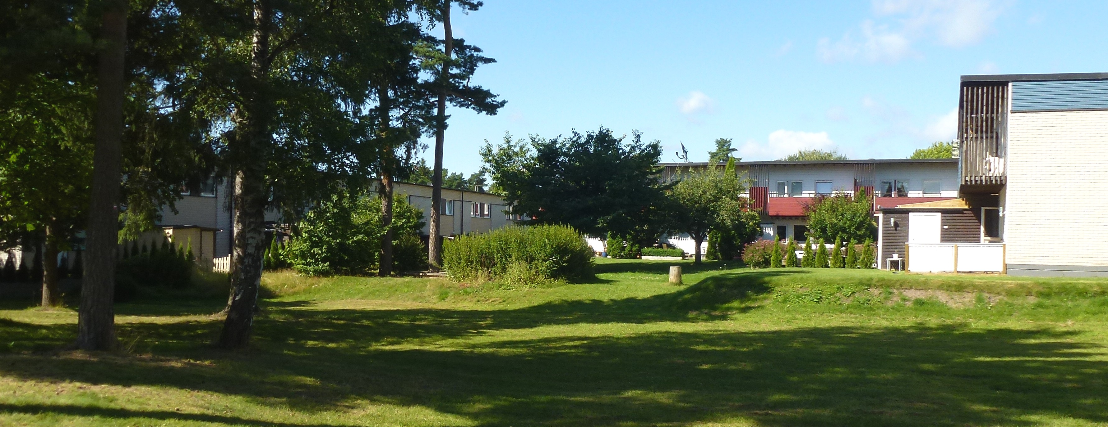 Småhusområdet Kälvesta Björnidevägen